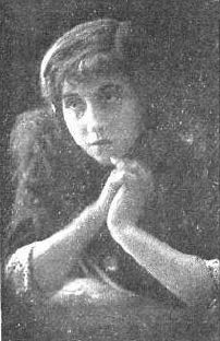 Fotografía de la pianista española Francisca Madriguera publicada en 1914 tras haber ofrecido varios conciertos en Madrid